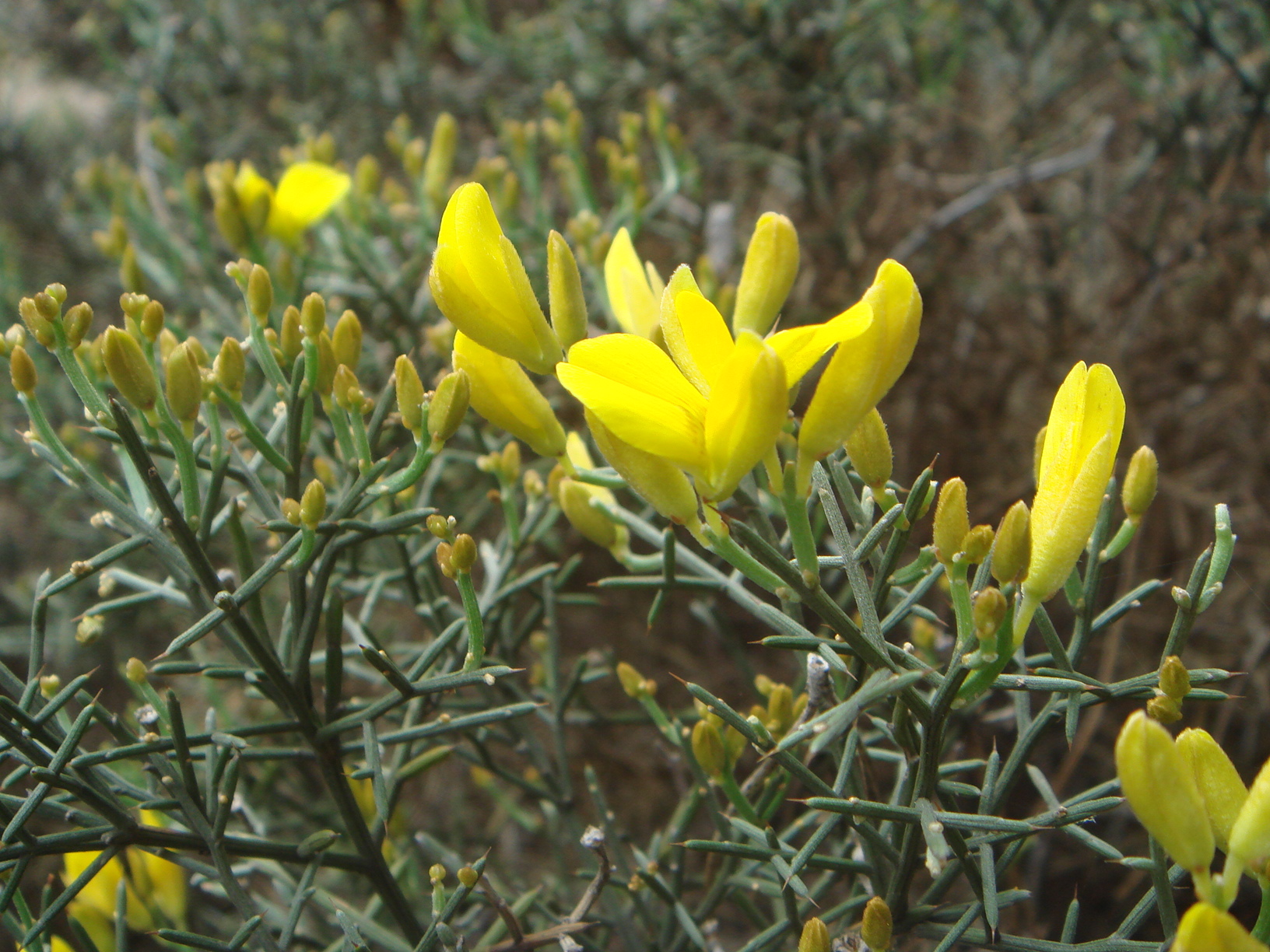 Stauracanthus genistoides, Chiclana de la Frontera (Provincia de Cádiz), Andalucía